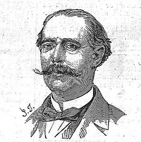 José Sánchez Bregua